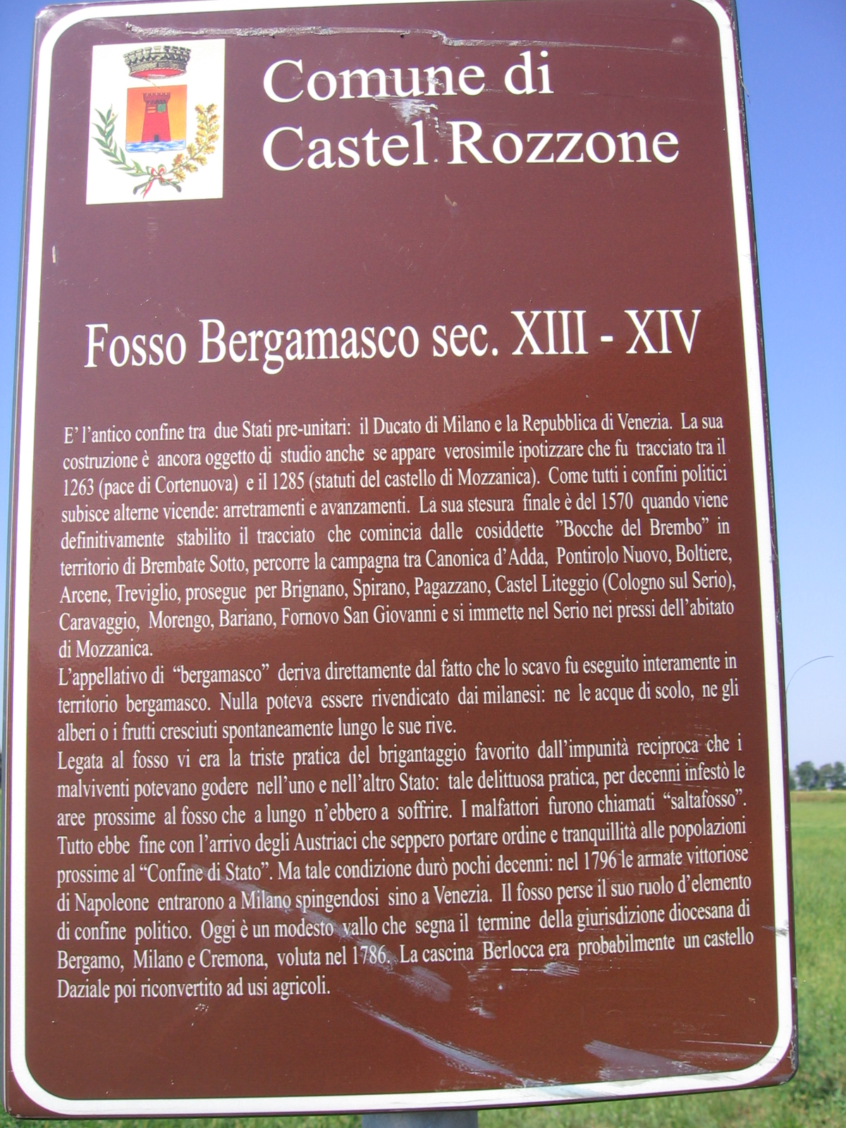 Pannello integrativo a Castel Rozzone riferito al Fosso bergamasco